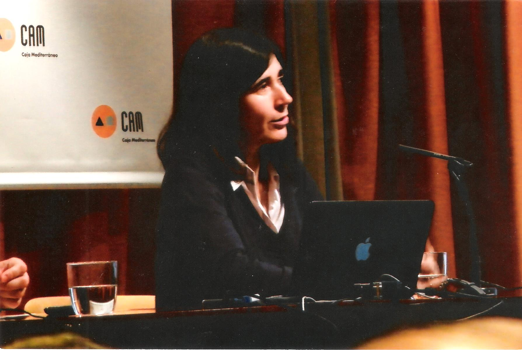 La doctora María Blasco en una conferencia impartida en el Aula CAM- Alicante el 4 de mayo de 2012 bajo el título "mecanismos moleculares del envejecimiento".